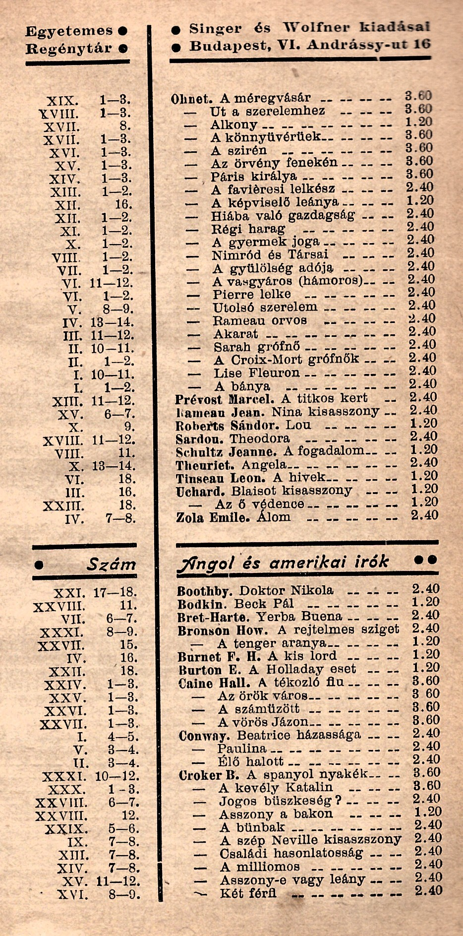 Az Egyetemes regénytár köteteinek jegyzéke (előzéklap Arthur Conan Doyle [1859-1930]: Napoleon [1911, Egyetemes regénytár] kiadásában)